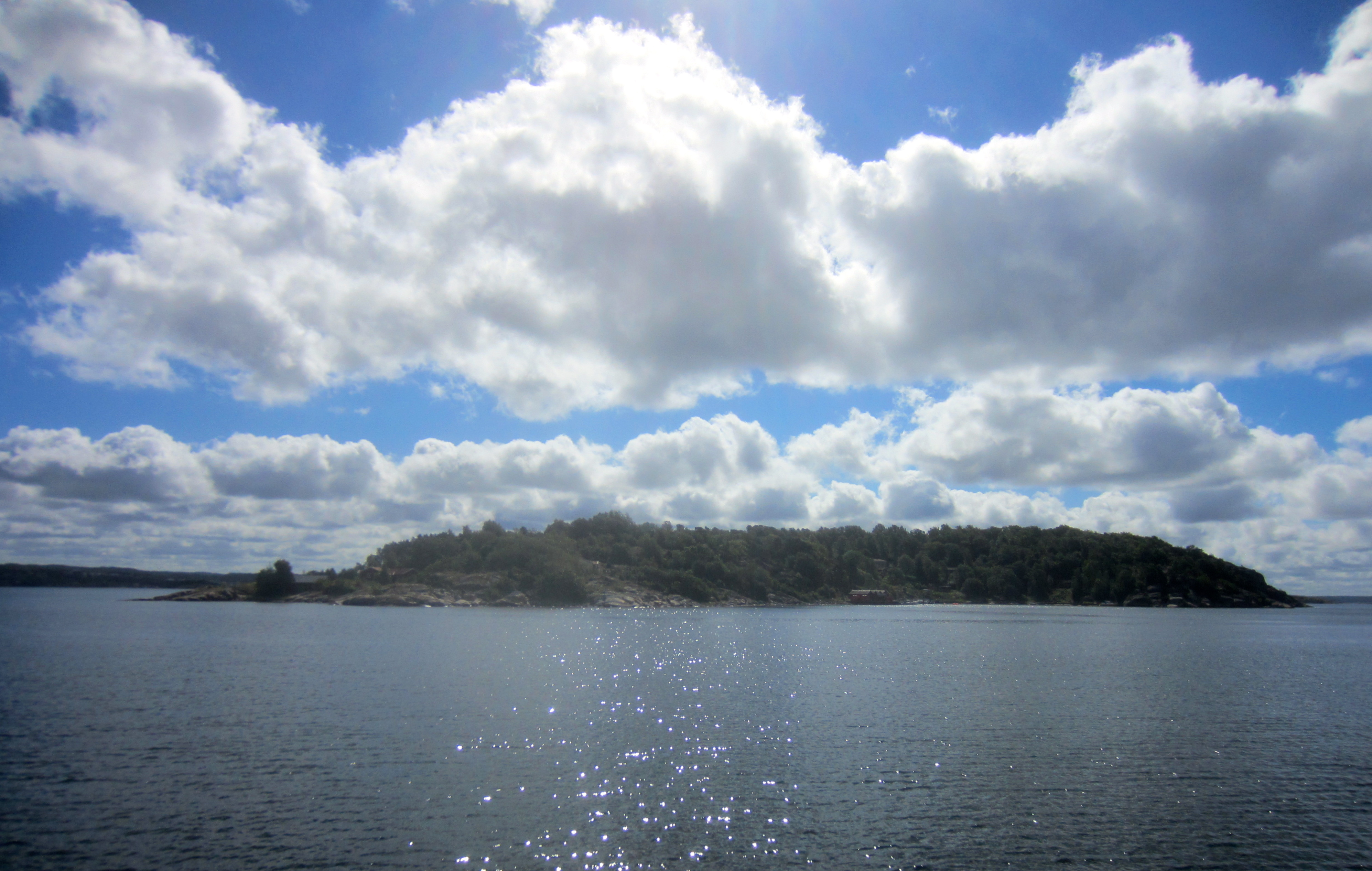 Lilla Brattön sedd från nordväst, augusti 2015.